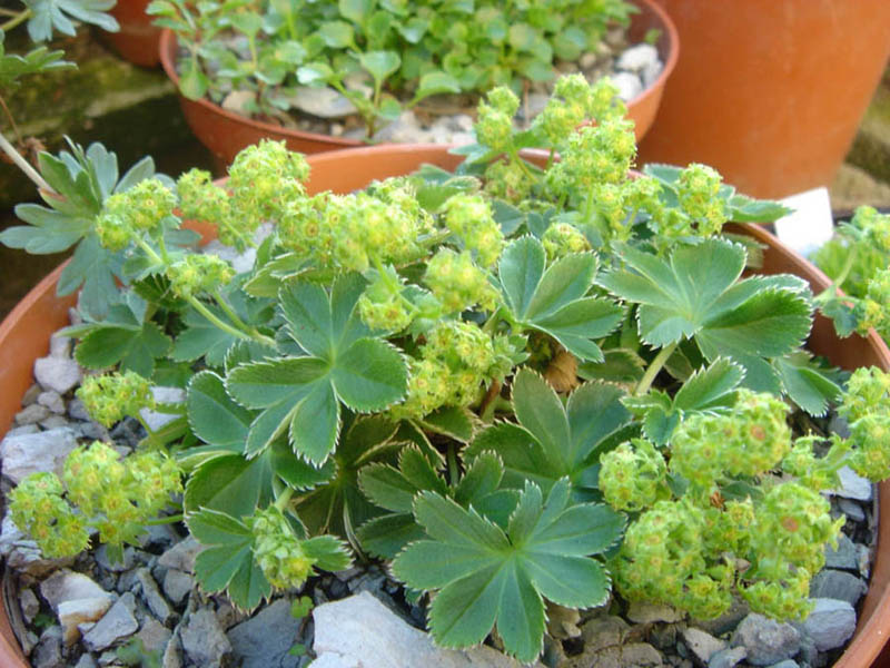 Alchemilla faeroensis var. pumilia